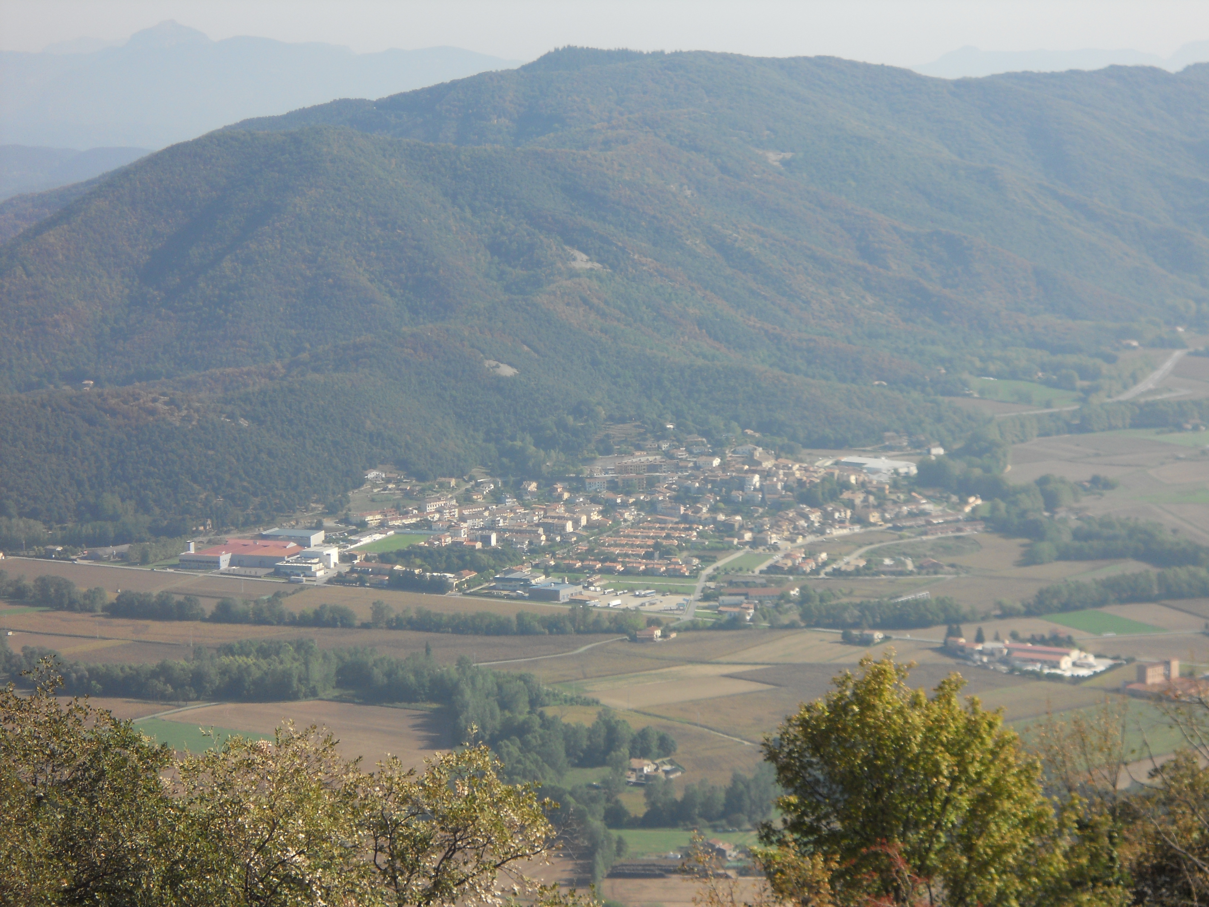 Vista de Sant Esteve d'en Bas a la Garrotxa.